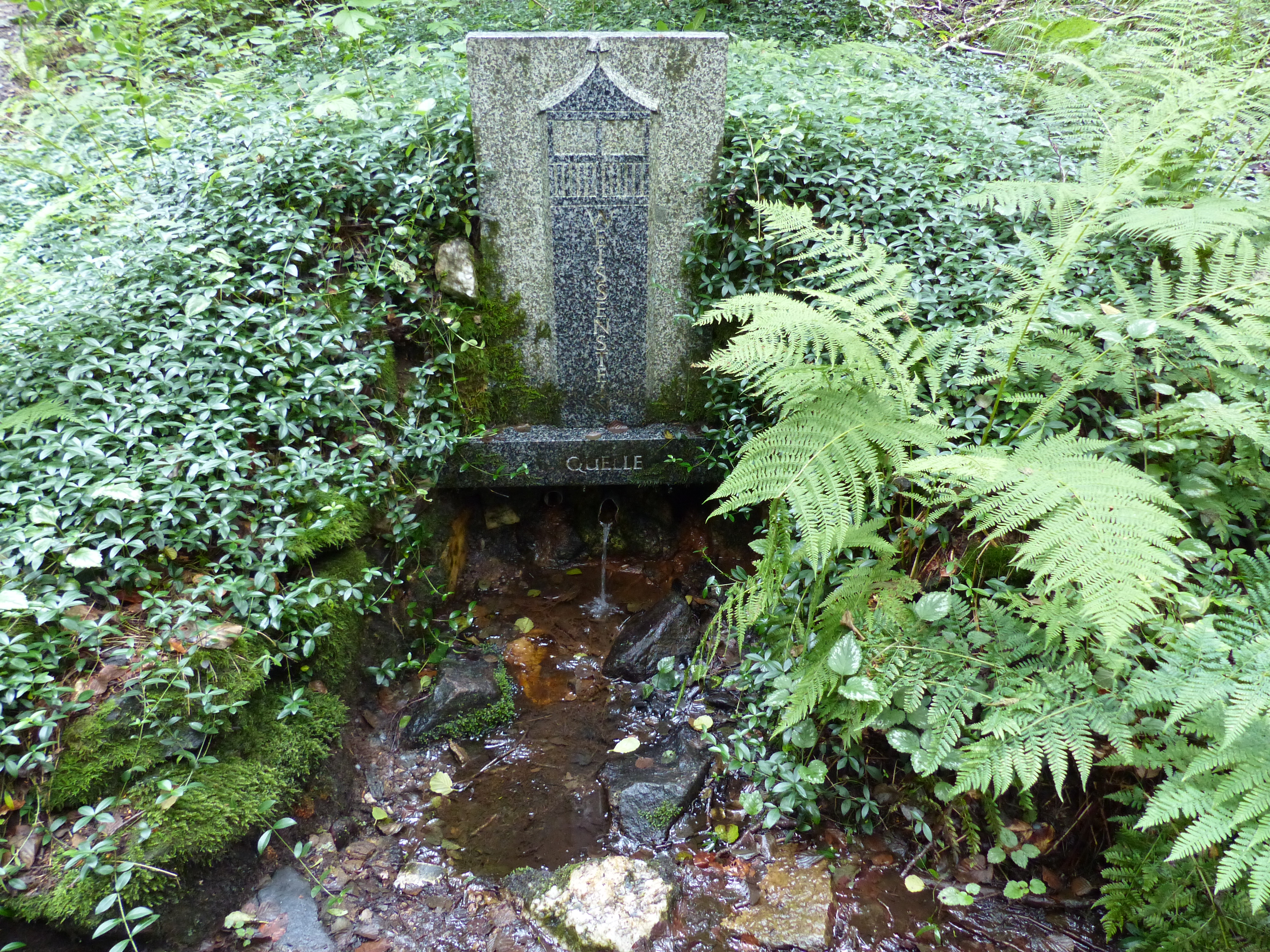 Serie Ansichten vom Weißenstein